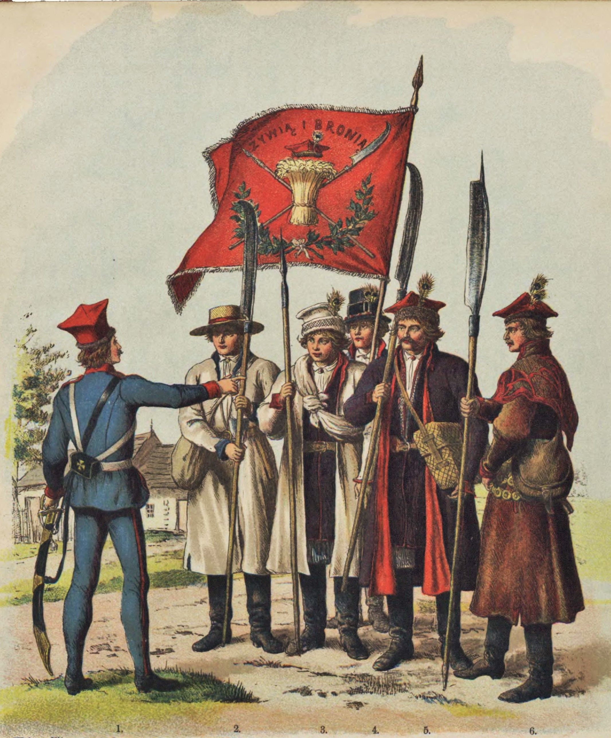 "Wojsko Polskie Kościuszki w roku 1794", Walery Radzikowski.